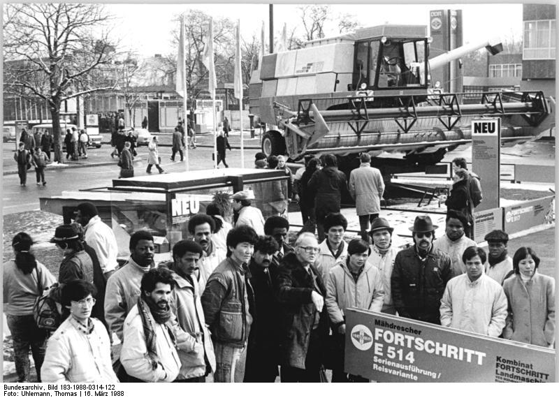 Leipzig, Frühjahrsmesse, ausländische Besucher ADN-ZB Uhlemann 16.3.88 Leipzig: Frühjahrsmesse - Unter den Besuchern der Messe sind auch Studenten aus Asien, Afrika und Lateinamerika, die seit einem halben Jahr an der Gewerkschaftshochschule "Fritz Heckert" in Bernau immatrikuliert sind. Aufmerksam besichtigten sie die Exponate des Kombinates Fortschritt Landmaschinen, die sie zum Teil schon aus ihrer Heimat kannten.